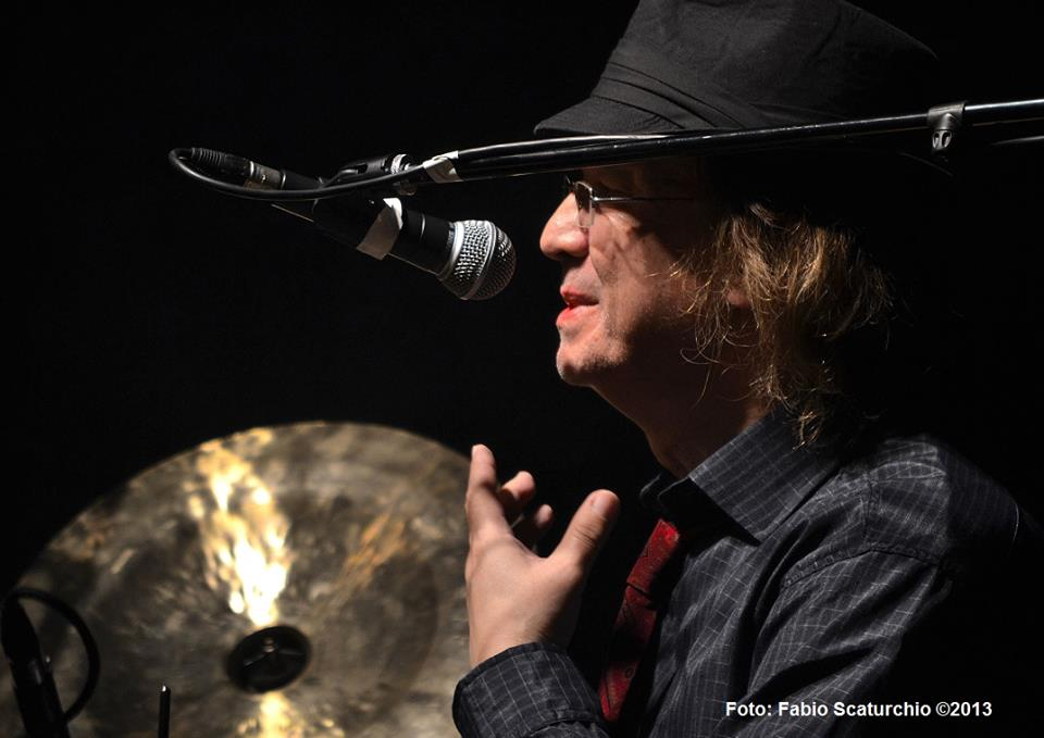 fabio scaturchio